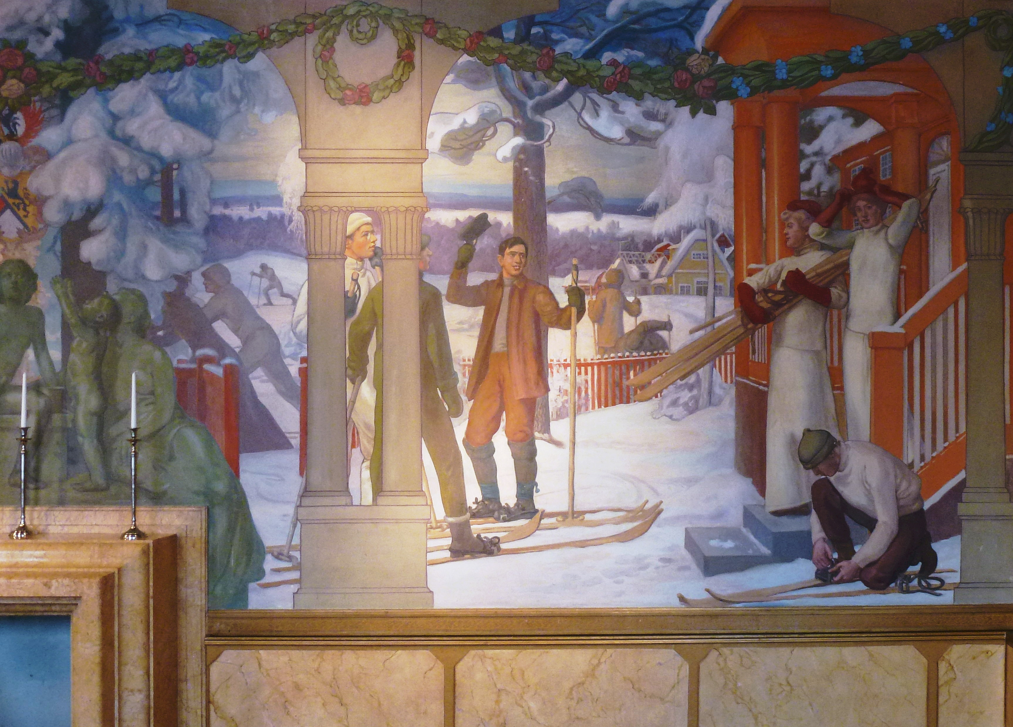 Del av freskomålningen "Åldrar och Årstider" av Georg Pauli (1855-1935) i Villa Paulis salong